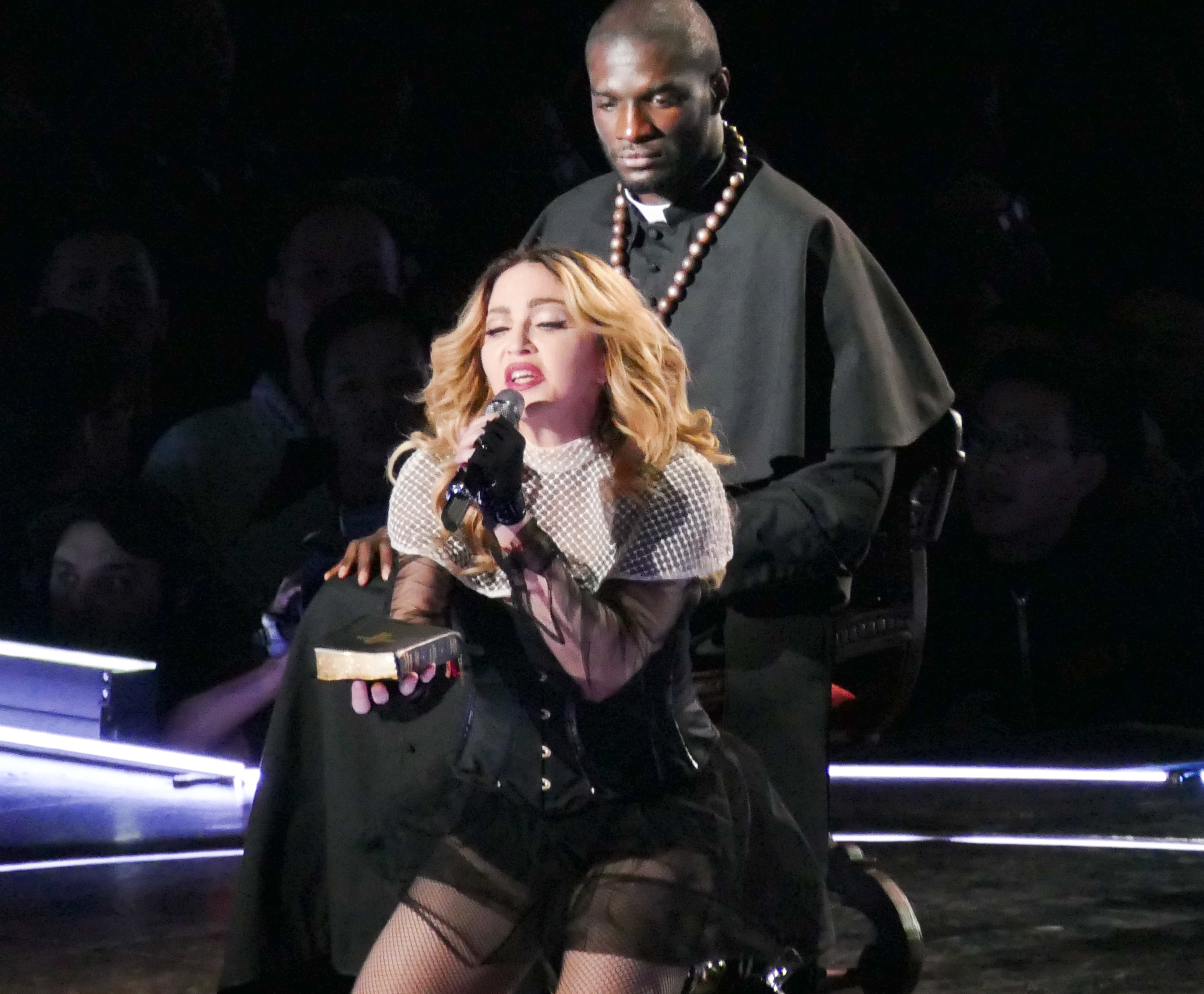 taipei_madonna_concert-51